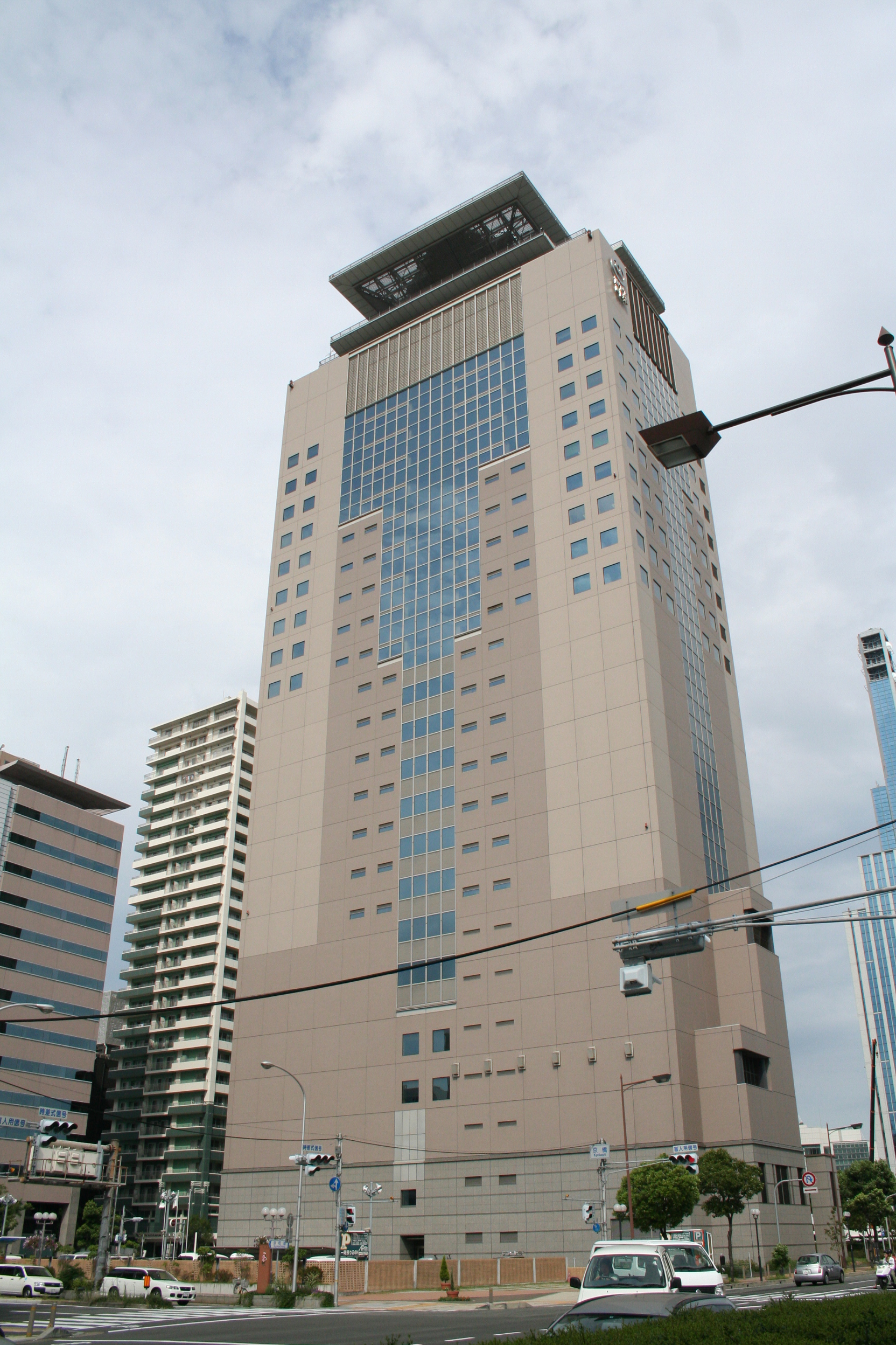 兵庫県神戸市中央区にある神戸市立博物館やその南を通る国道2号線(海岸通)沿いの町並み。 NTT西日本神戸中央ビル。西側から撮影。